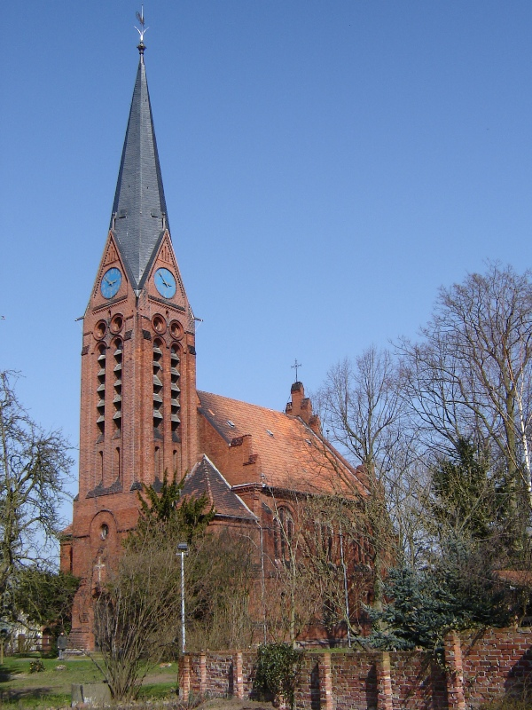 Burg-Parchau, Sachsen-Anhalt, Kirche